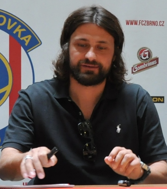 Pavel Zavadil (2014)